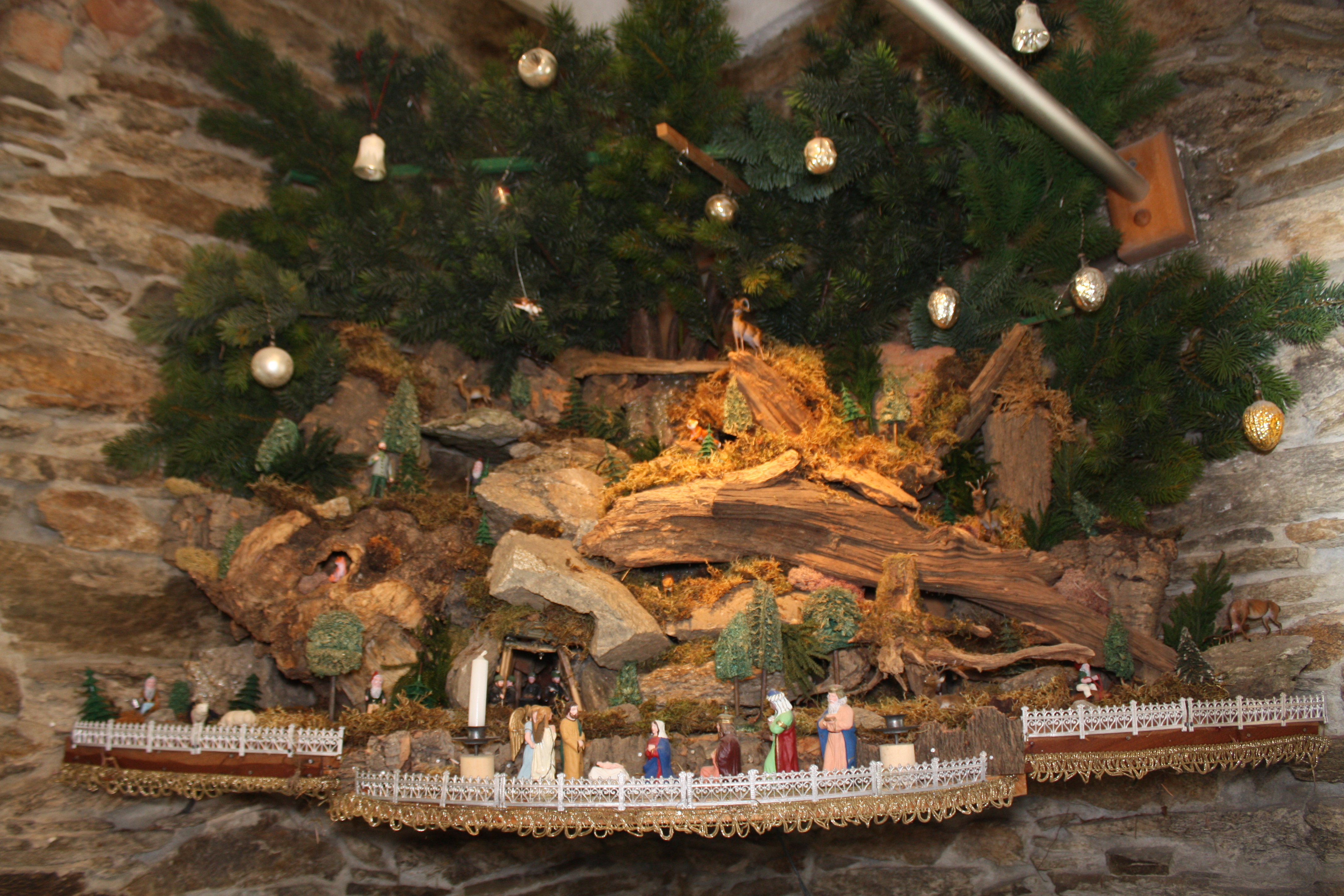 Weihnachtswinkel mit Massefiguren, Krippe, Bergleute, Zwerge und Jagdszenerie